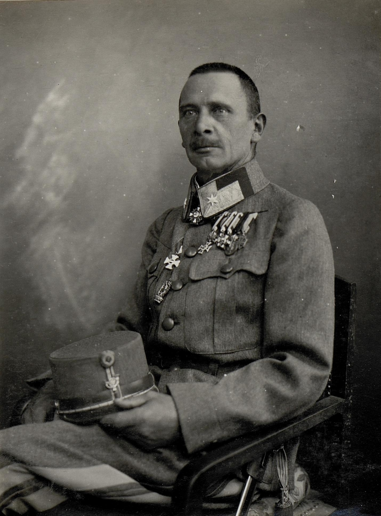 Generalmajor von Ellison, Trient